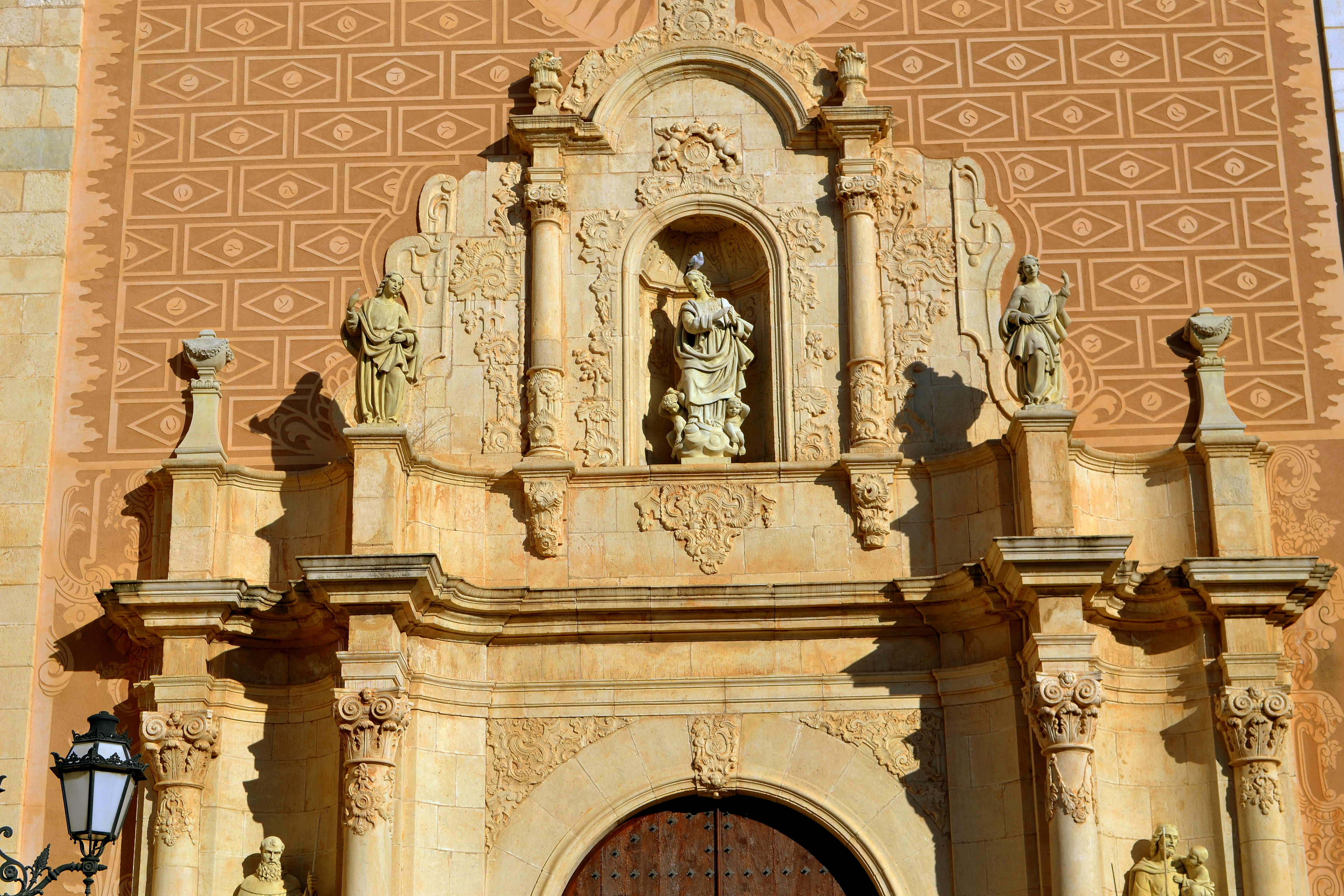 Església parroquial de Santa Maria Assumpta (les Borges del Camp)